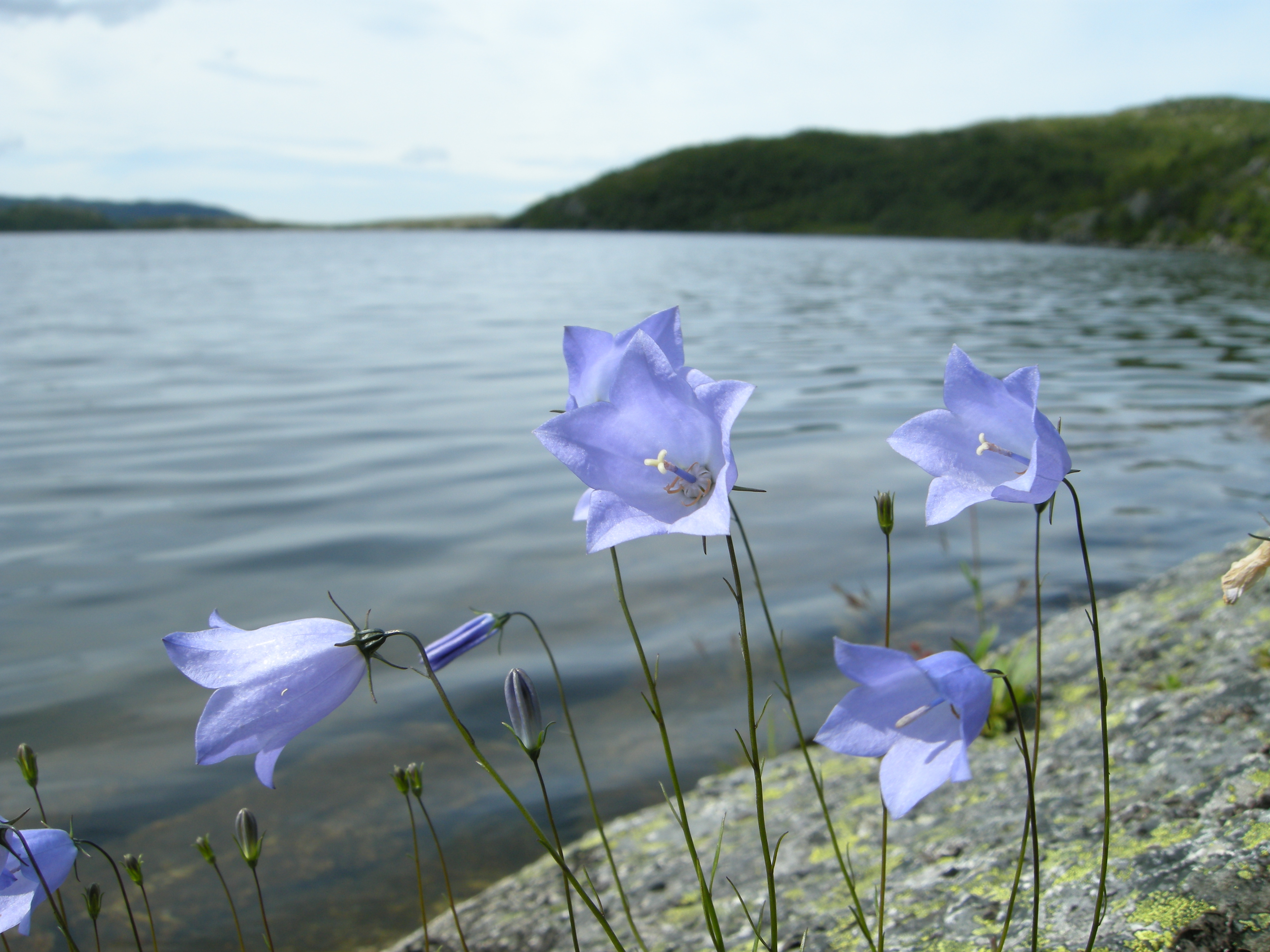 Campanula rotundifolia